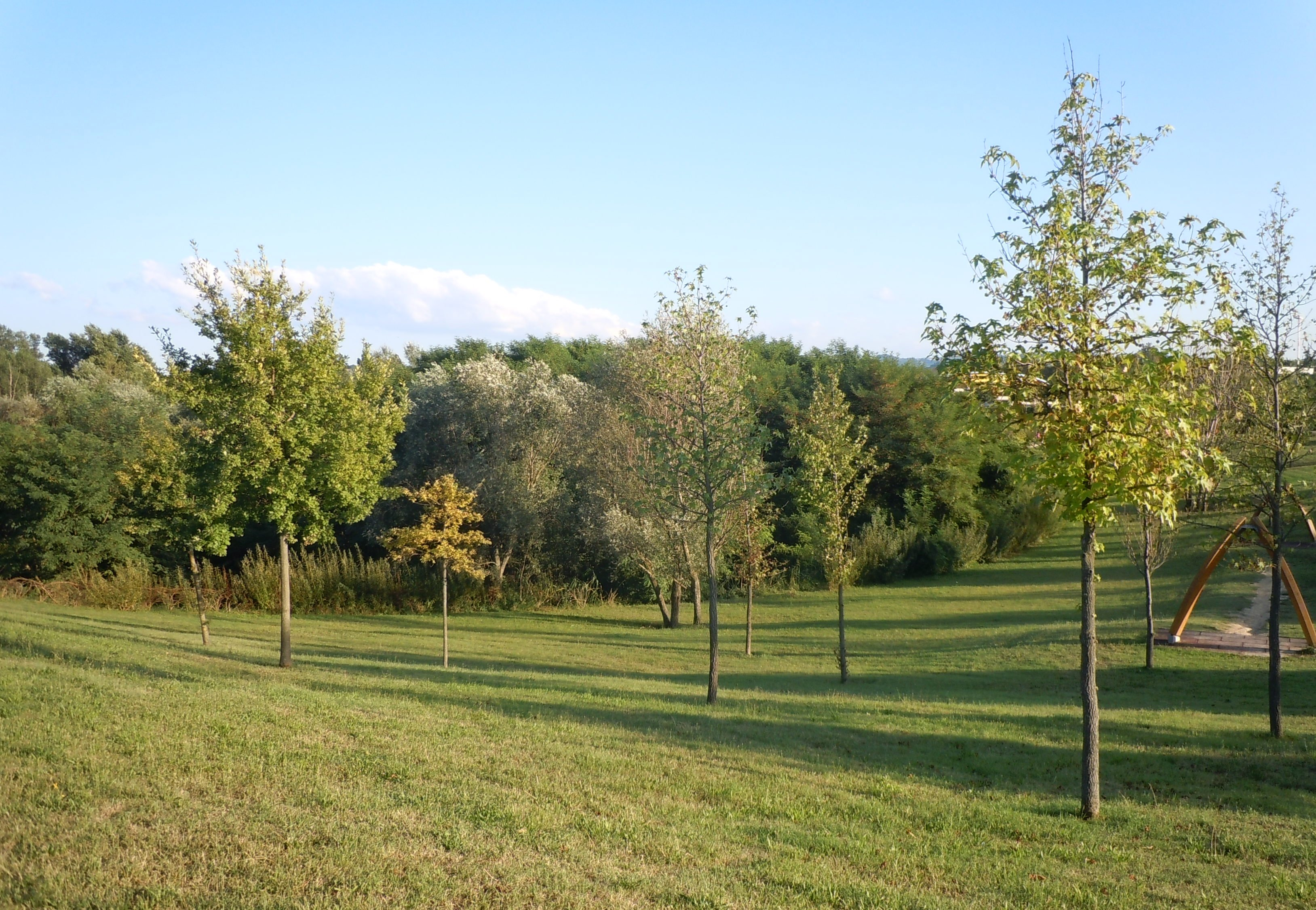 Cesena (FC, Italy): Parco Urbano dell'Ippodromo - Natural reserve